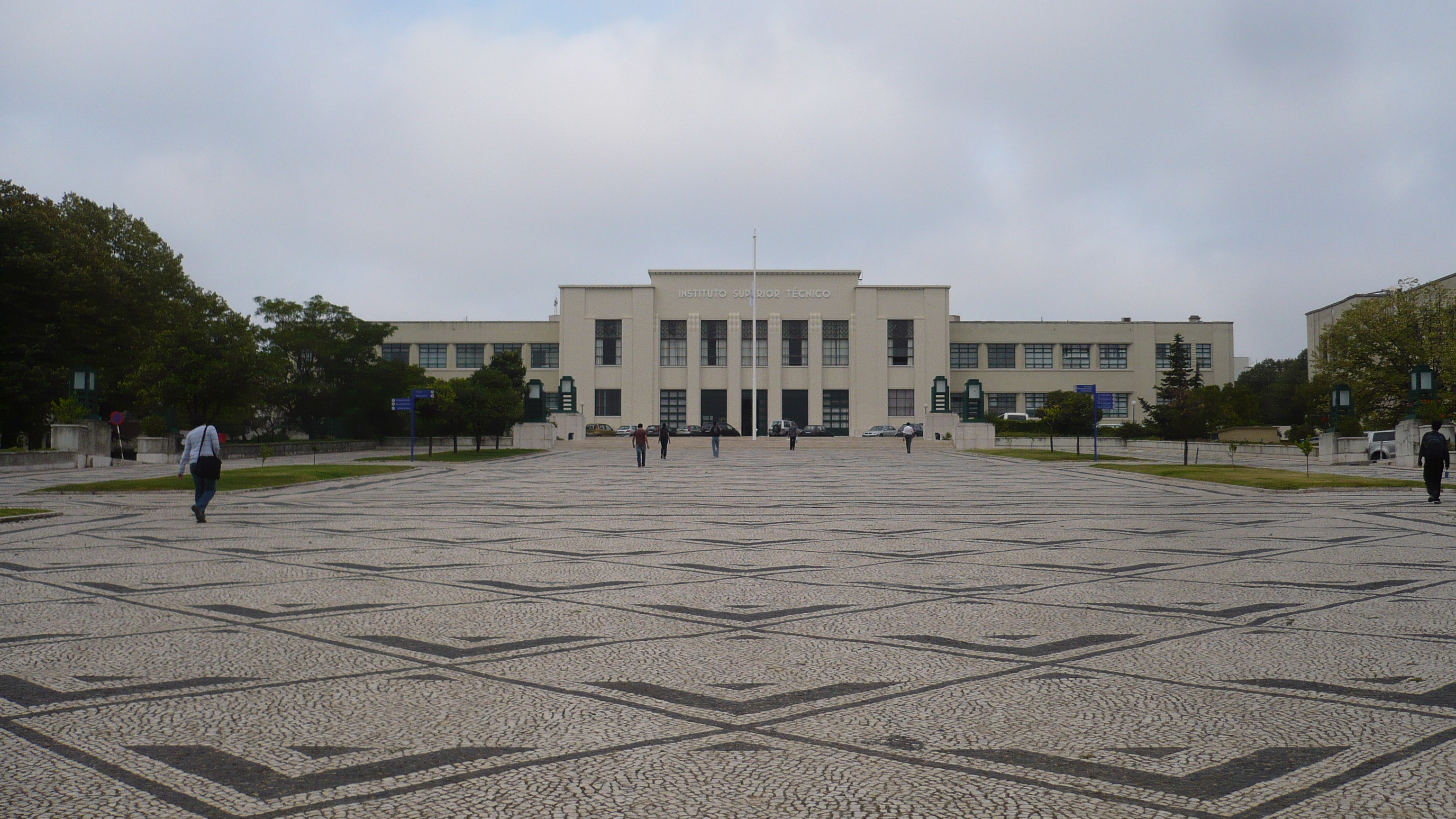 Es la facultad de la Universidad Técnica de Lisboa donde voy a tener clases. El que se ve es el edificio administrativo (central)